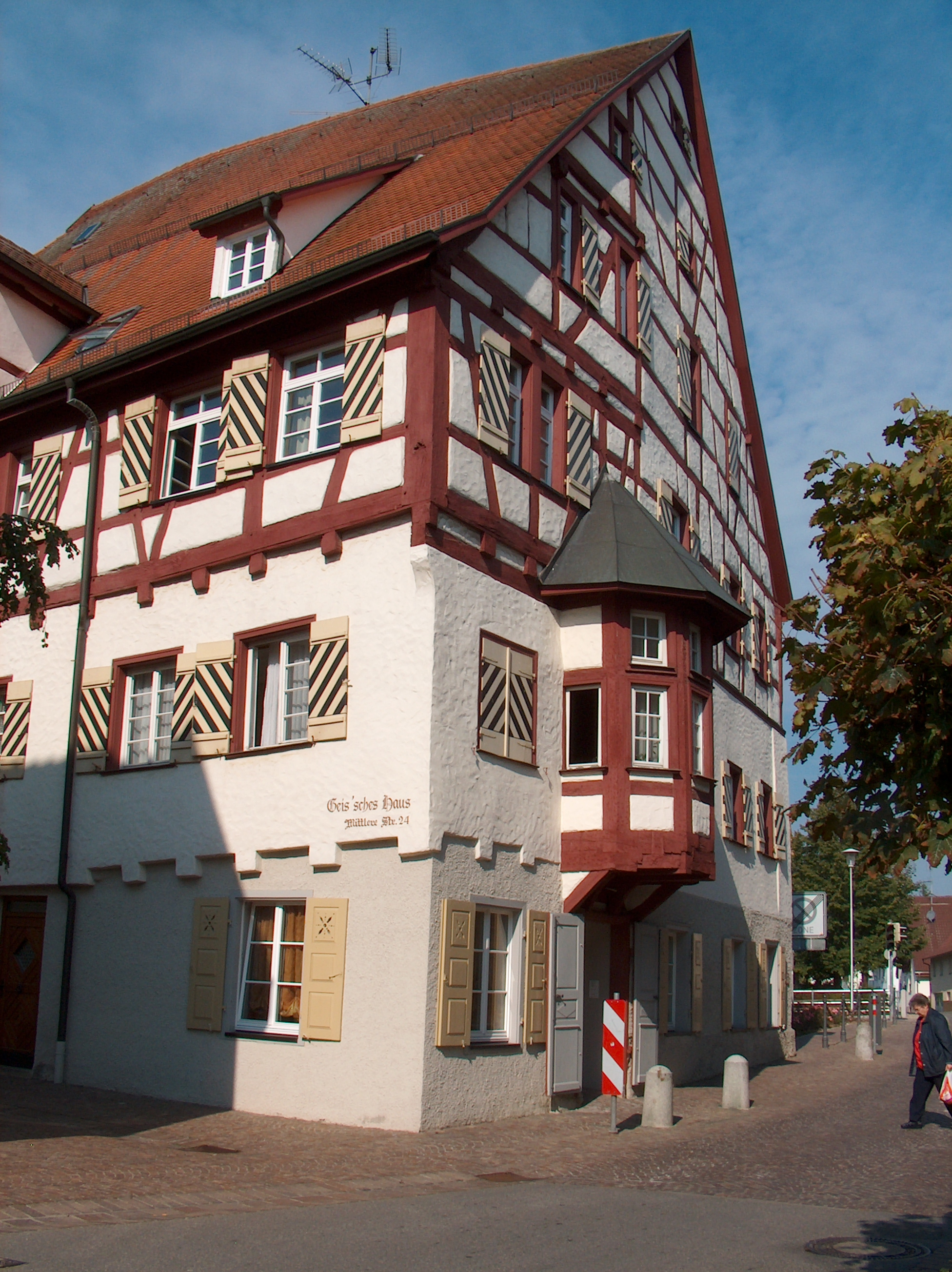 La Gais'sche maison en Mengen Le photographe: Roland Nonnenmacher - D-72516 Scheer Date de la génération de données : 22 septembre 2005 à